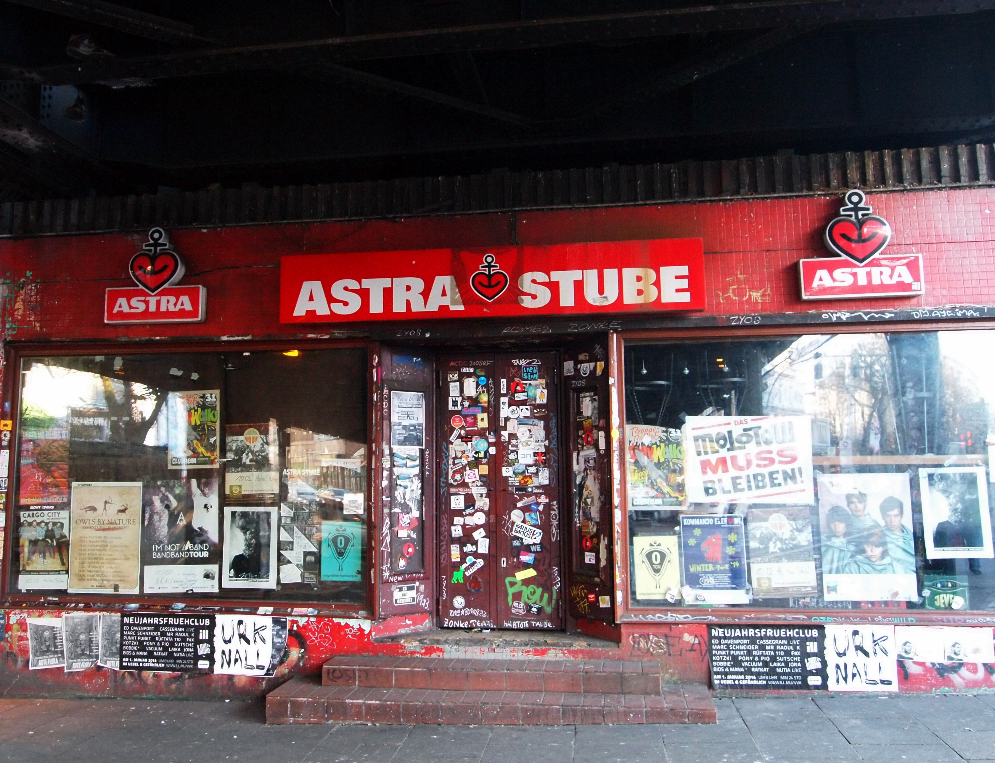 Astra-Stube unter der Sternbrücke, Hamburg Altona Stresemannstraße